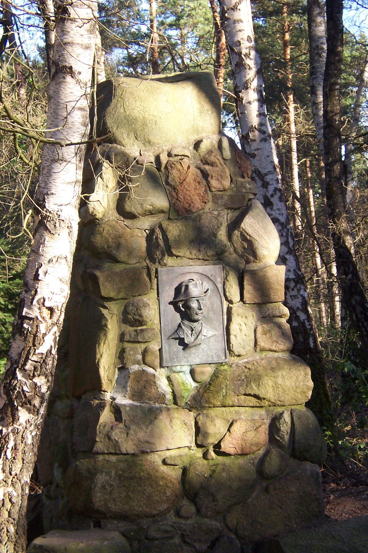 Hermann-Löns-Denkmal auf dem Hünsberg, Coesfeld, NRW, Germany.